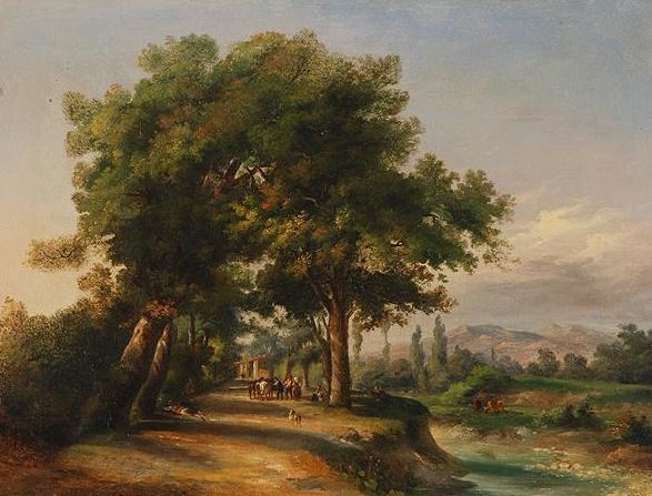 Paesaggio, olio su tela, coll. privata